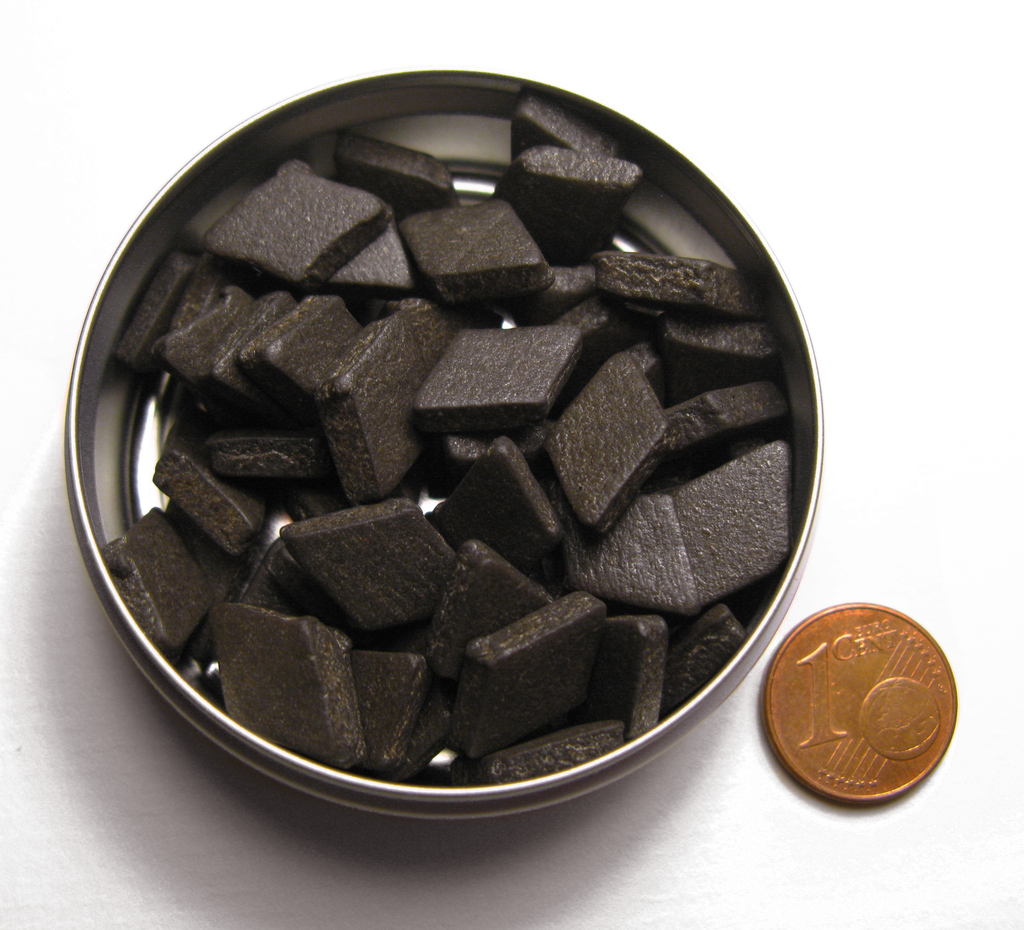 Salmiakpastillen im Größenvergleich zur Eurocentmünze